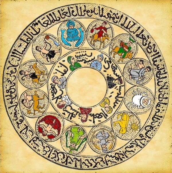 Zodiaque arabo-Musulman du 13 siècle, Les 12 Signes ainsi que les 7 planètes. sont représentes par les caractéristiques classiques assimilés à un dieu du Panthéon.